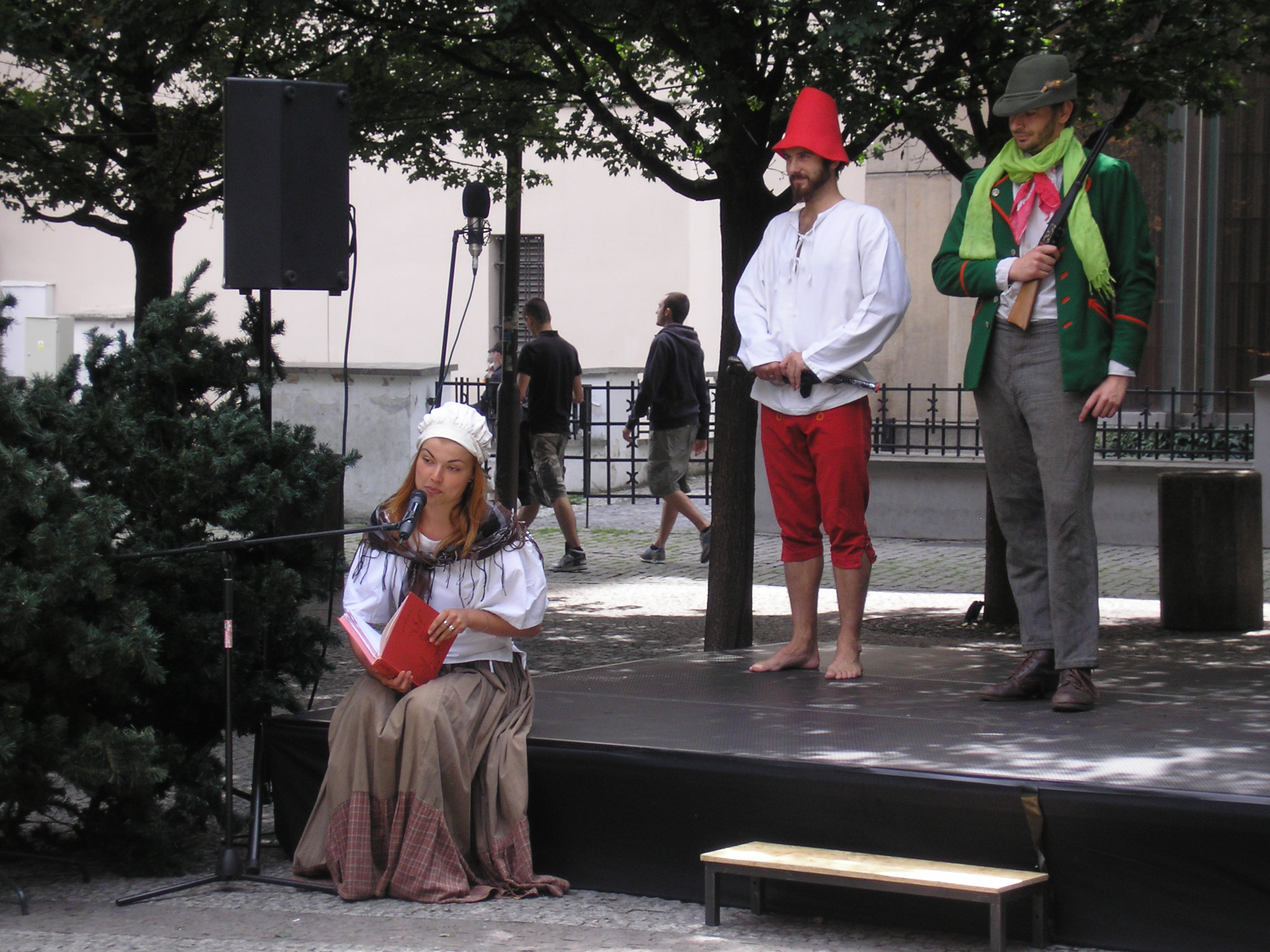 Herci ztvárňující v Praze na Staroměstském náměstí pohádku O loupežníku Rumcajsovi